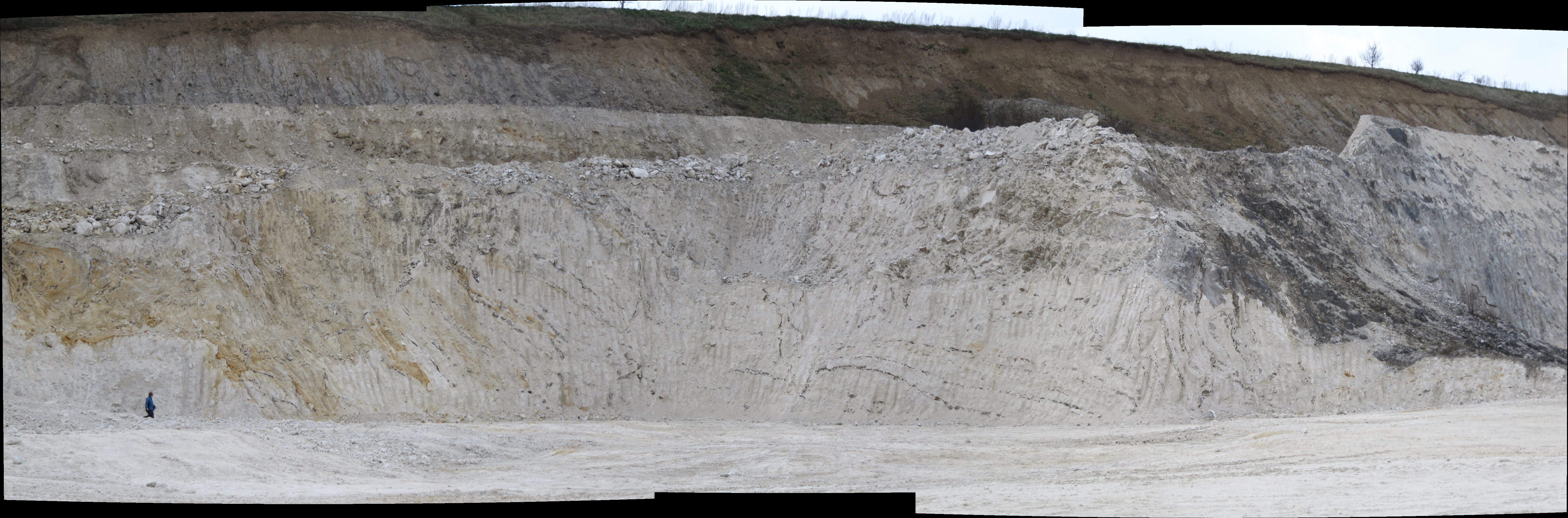 Glacialt forstyrret koralkalk, Faxe